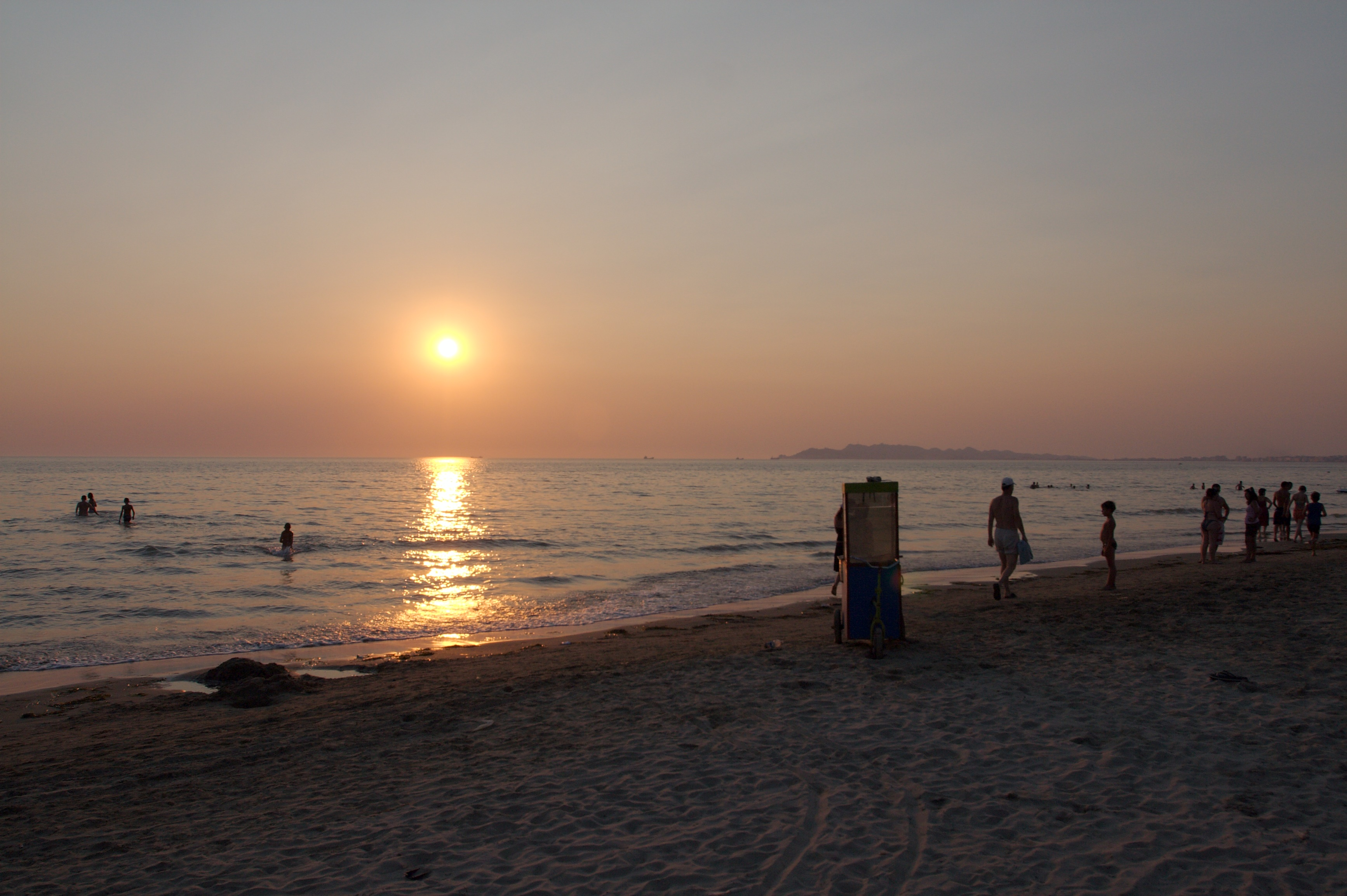 Sunset in Durrës, Albania